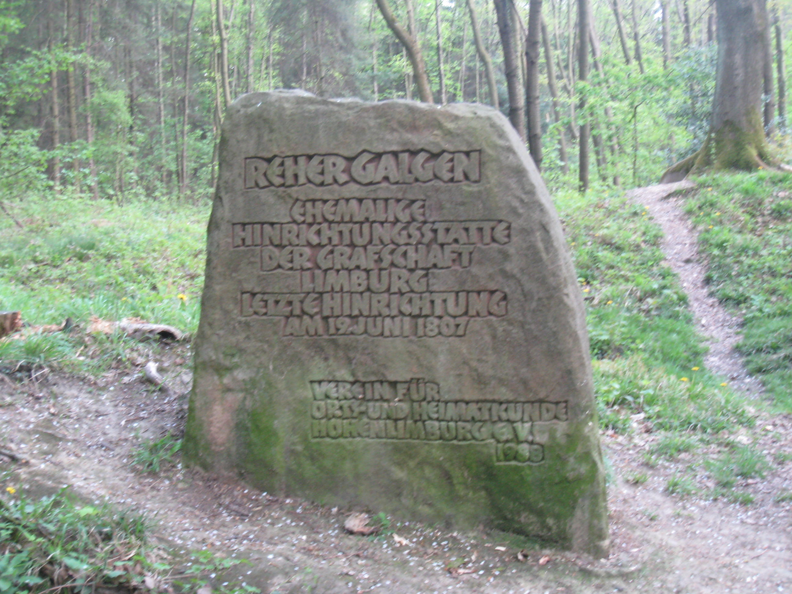 Gedenkstein an den Reher Galgen des Verein für Orts- und Heimatkunde Hohenlimburg